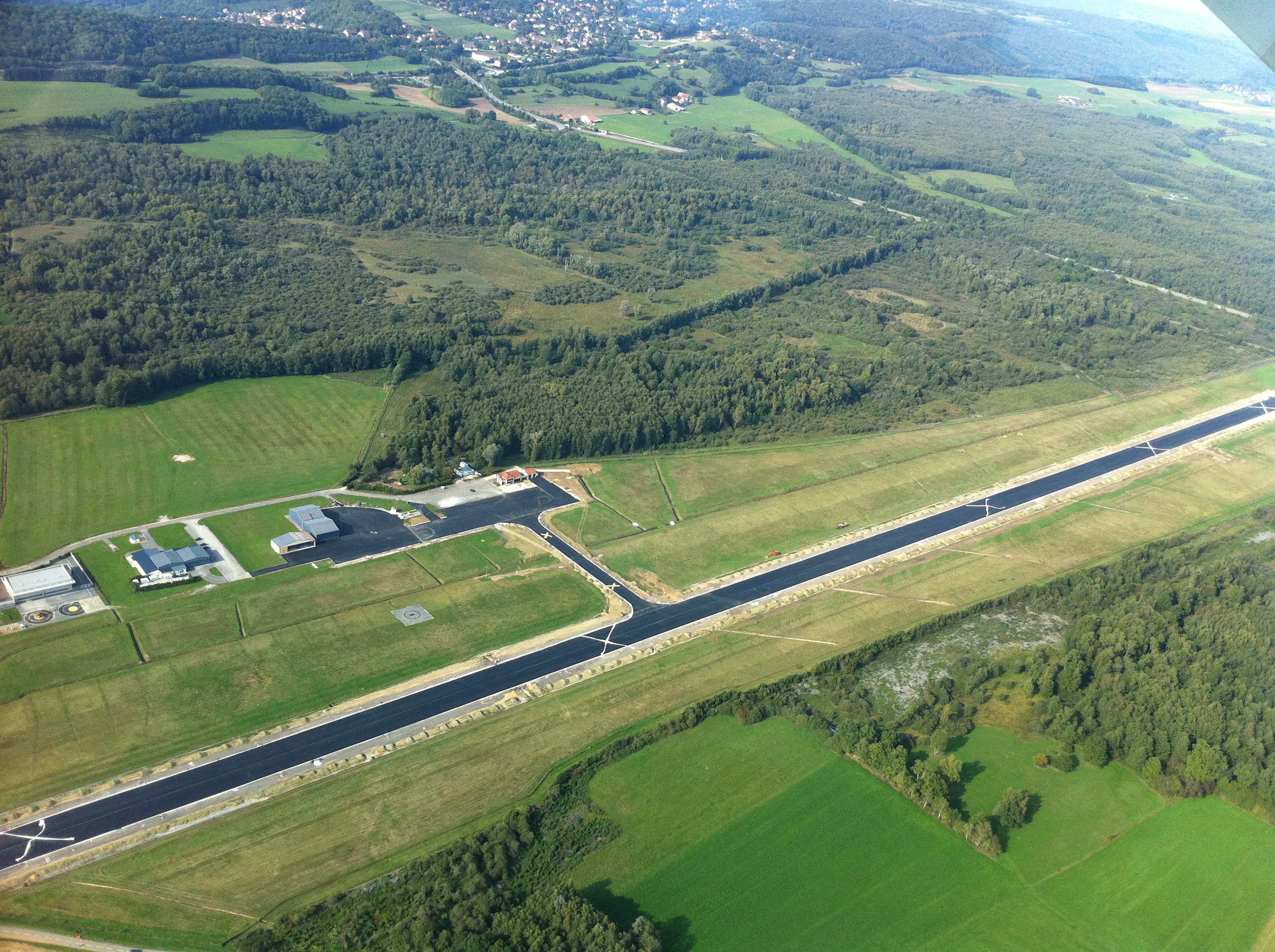 24 septembre 2011 (Piste, taxiways et parking revêtus. Câblage en cours).